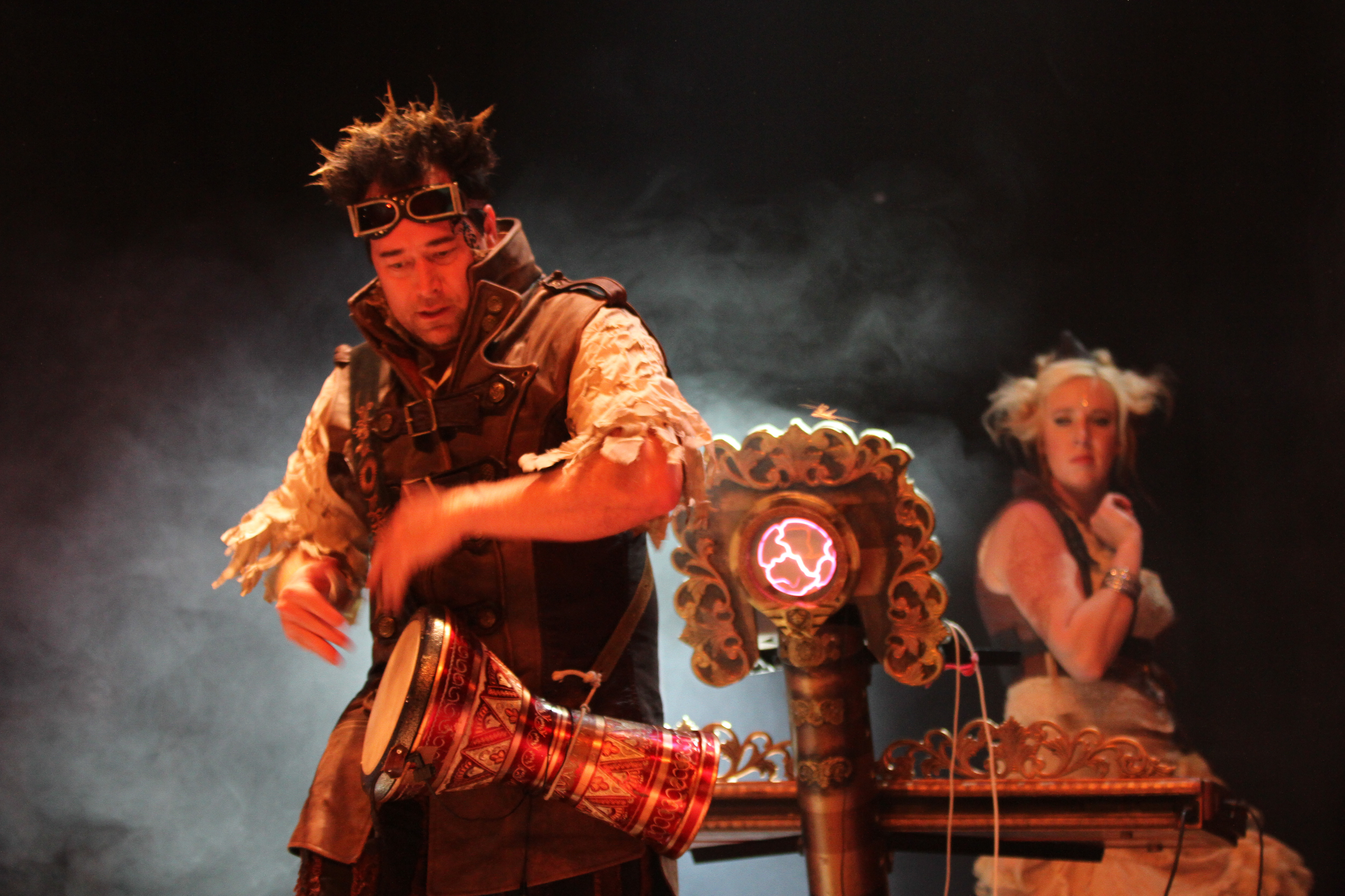 Abney Park auf dem Wave-Gotik-Treffen 2013 in Leipzig, Agra-Halle.